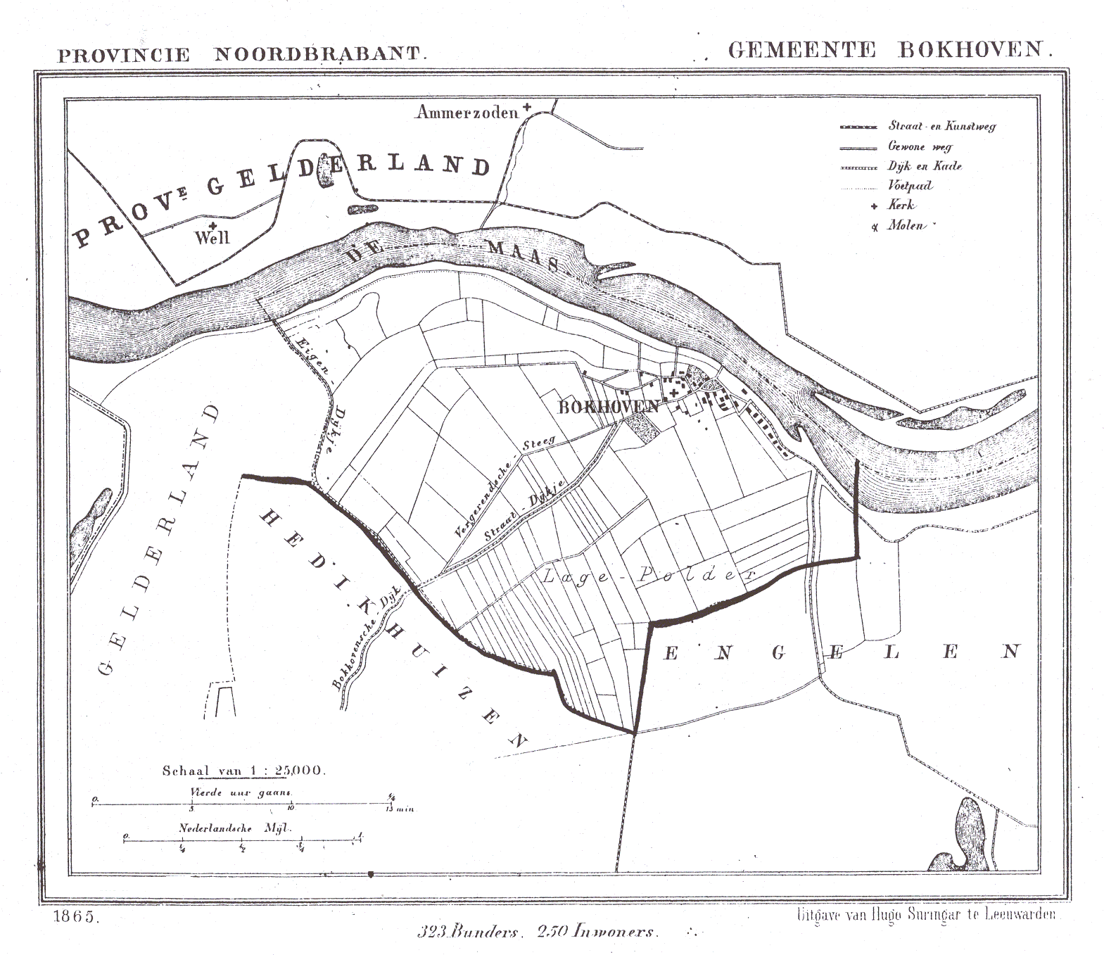 Nederland, Noord-Brabant, Gemeente Bokhoven